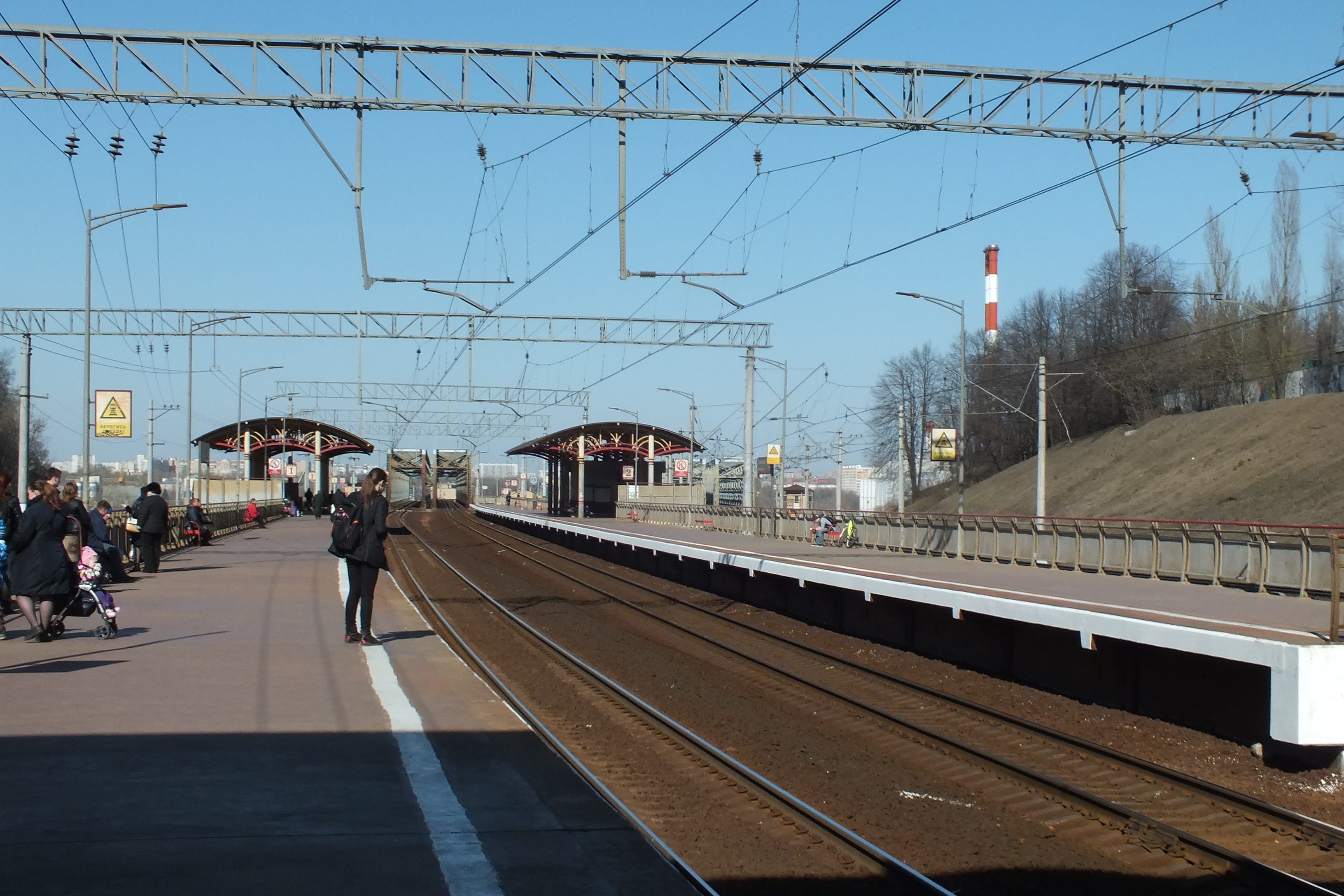 Платформа «Москворечье», вид с пути от Москвы (в сторону Подольска, Тулы). Апрель 2015 года.